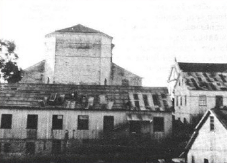 Casarão de madeira que serviu de segunda sede do Colégio do Carmo em Caxias do Sul entre 1911 e 1928.